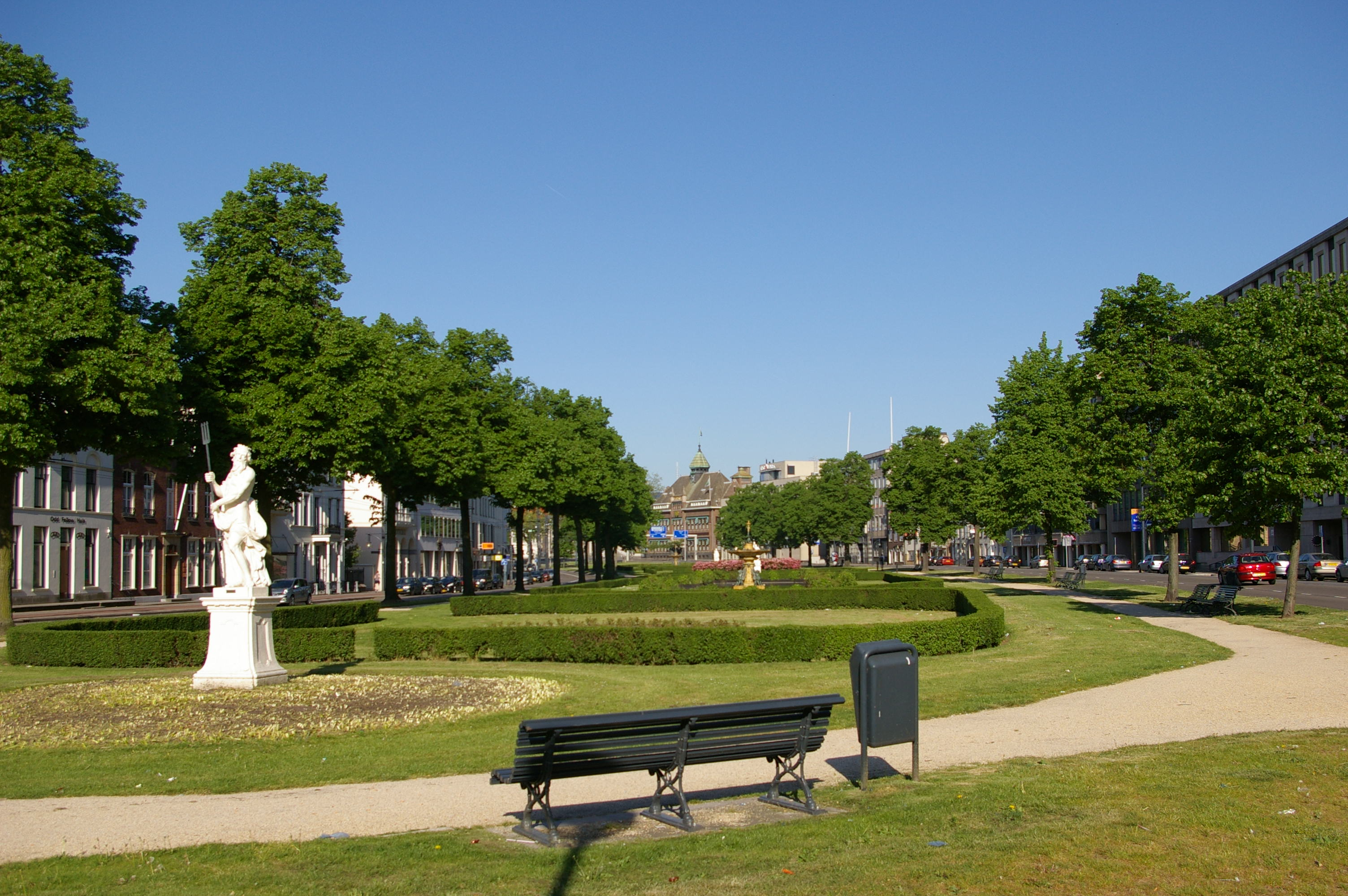 Arnhem, Jansbinnensingel, used on Arnhem